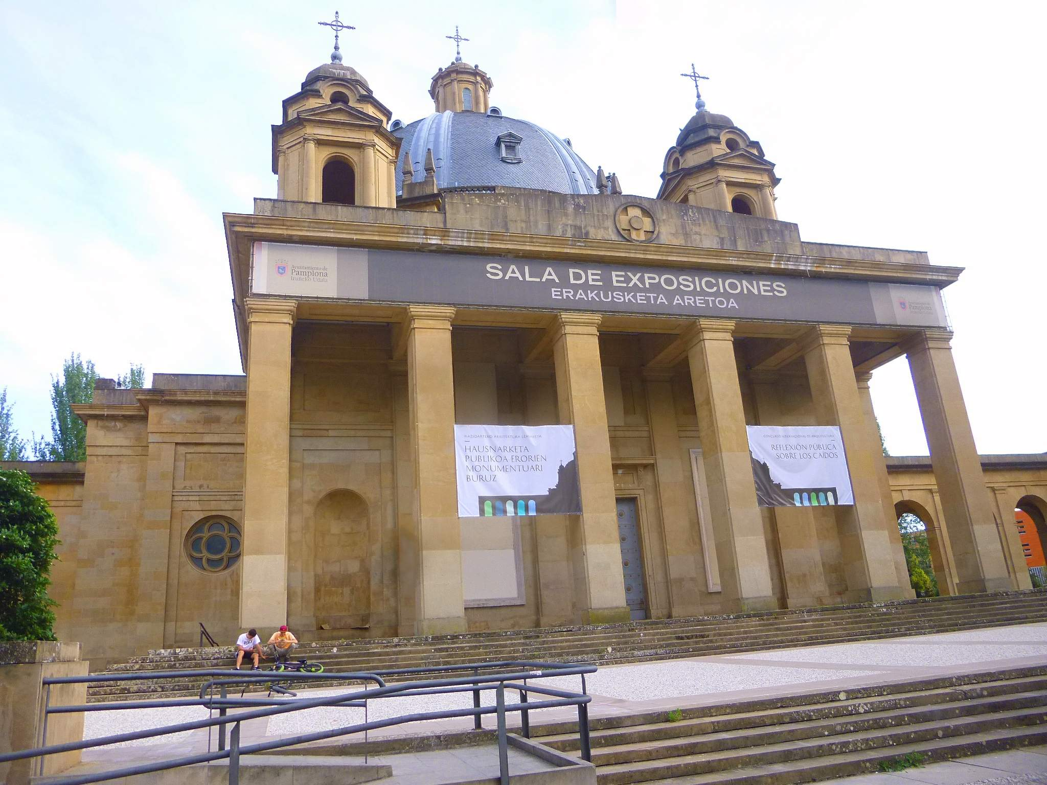 Pamplona - Sala de Exposiciones Conde de Rodezno (ex Monumento a los Caídos)